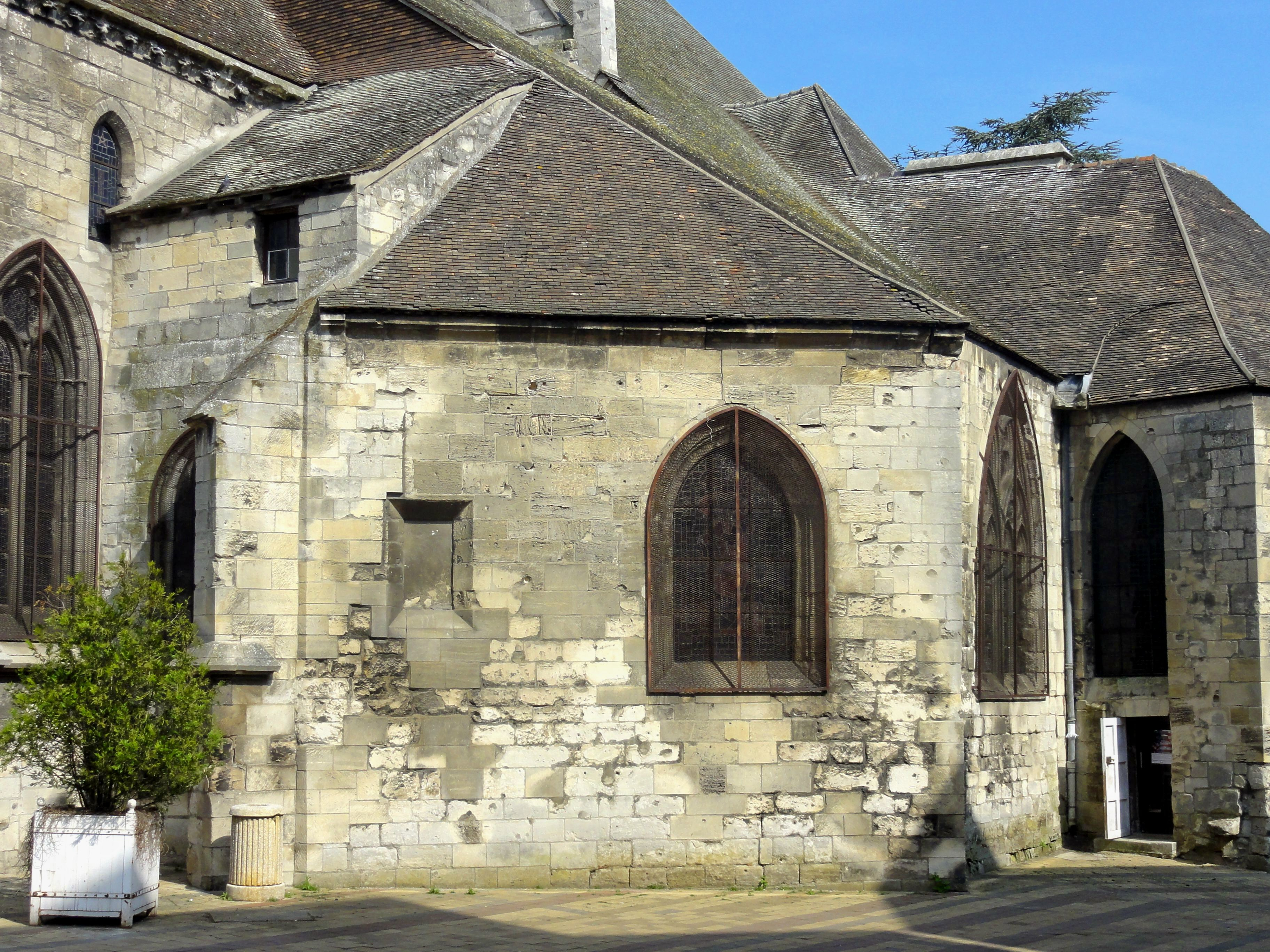 Seconde (et dernière) travée de l'ancien collatéral sud du chœur, remanié pendant la seconde moitié du XVe siècle, avec un mur biais.